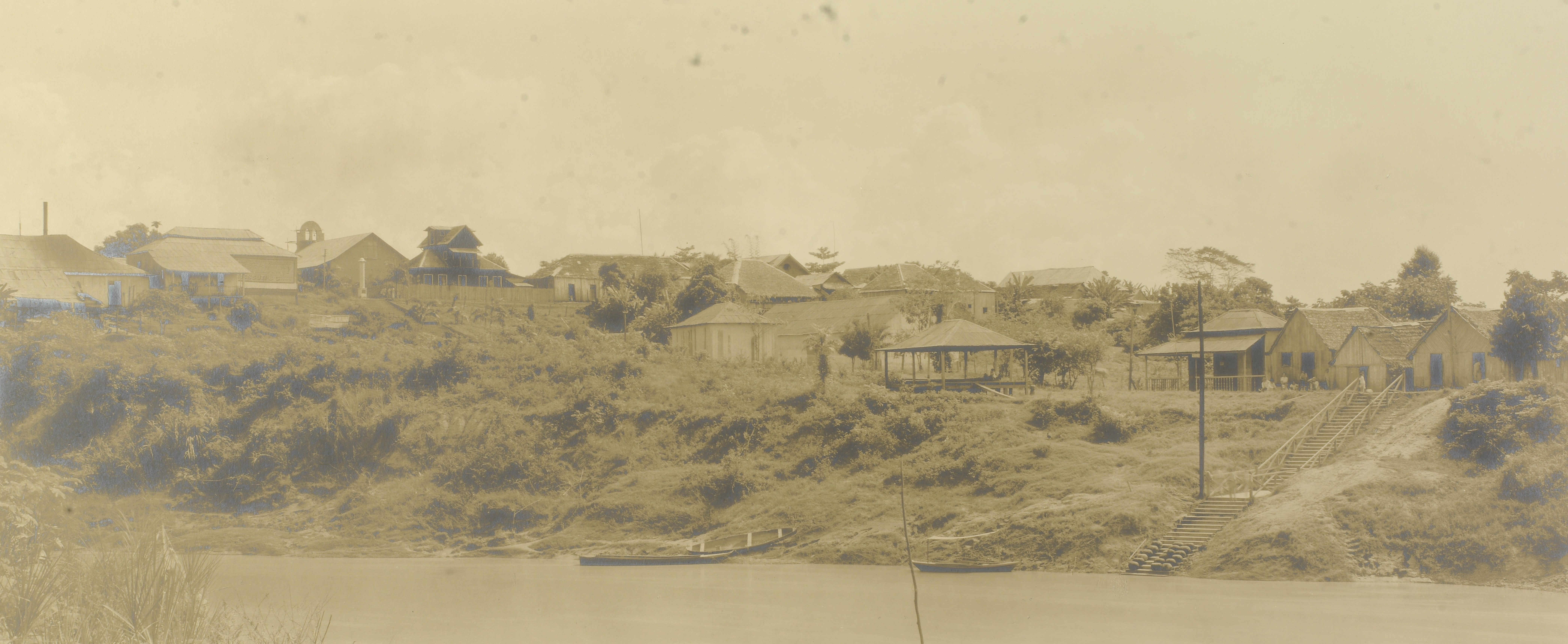 Imagem do Fundo Ministério da Guerra, do Arquivo Nacional